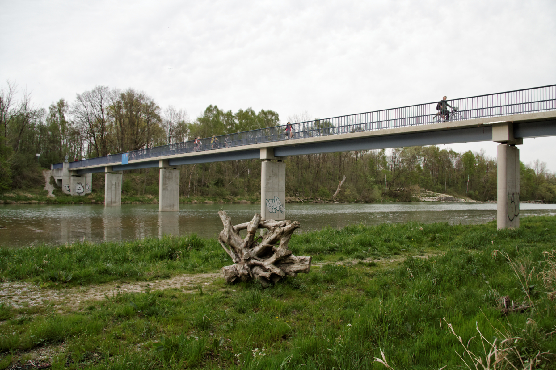 München, Isarsteg Unterföhring, Füßgänger- und Radfahrerbrücke über die Isar zwischen der der Oberen Isarau und Unterföhring